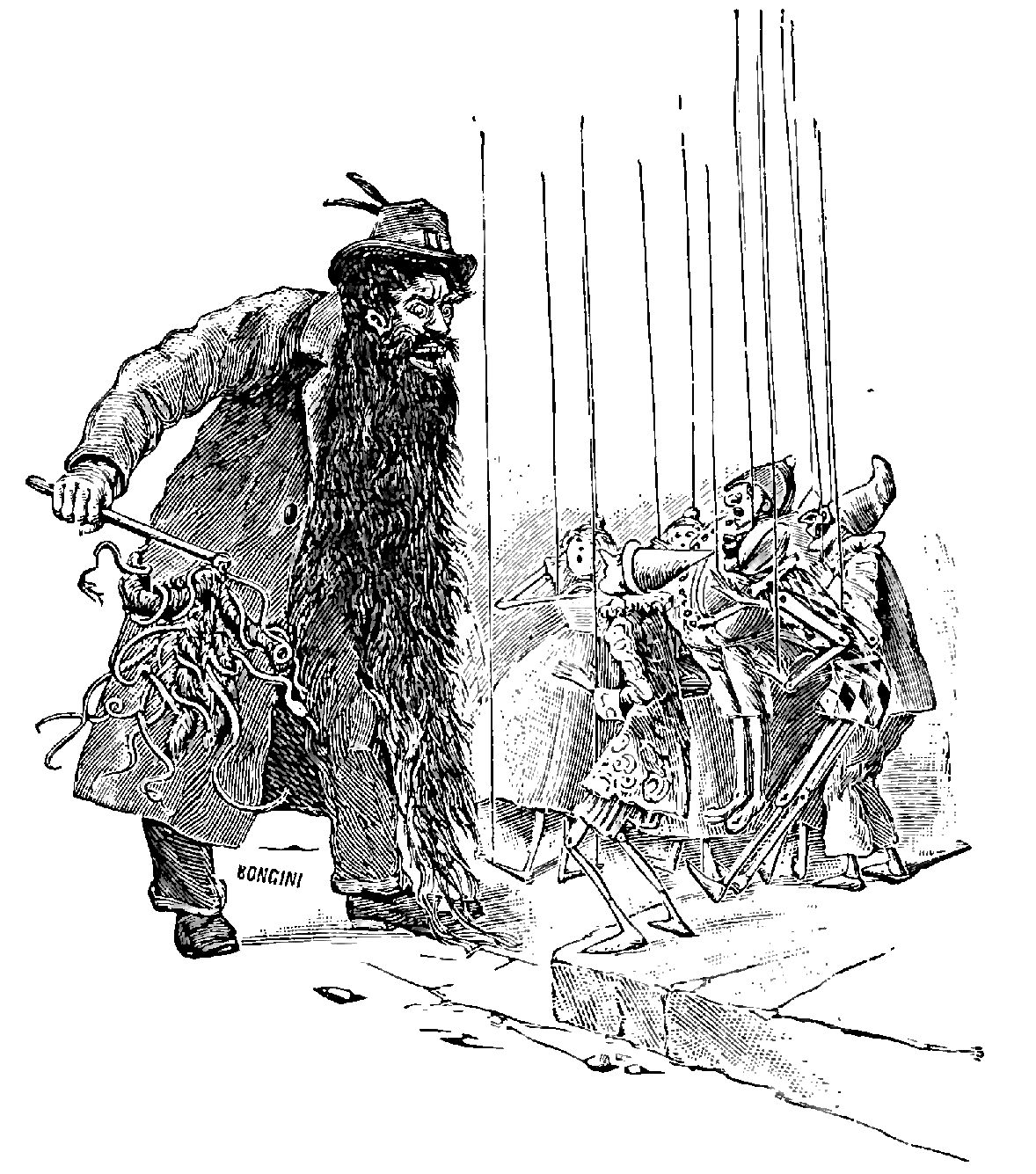 Illustrations from "Le avventure di Pinocchio, storia di un burattino", Carlo Collodi, Bemporad & figlio, Firenze 1902 (Drawings and engravings by Carlo Chiostri, and A. Bongini)